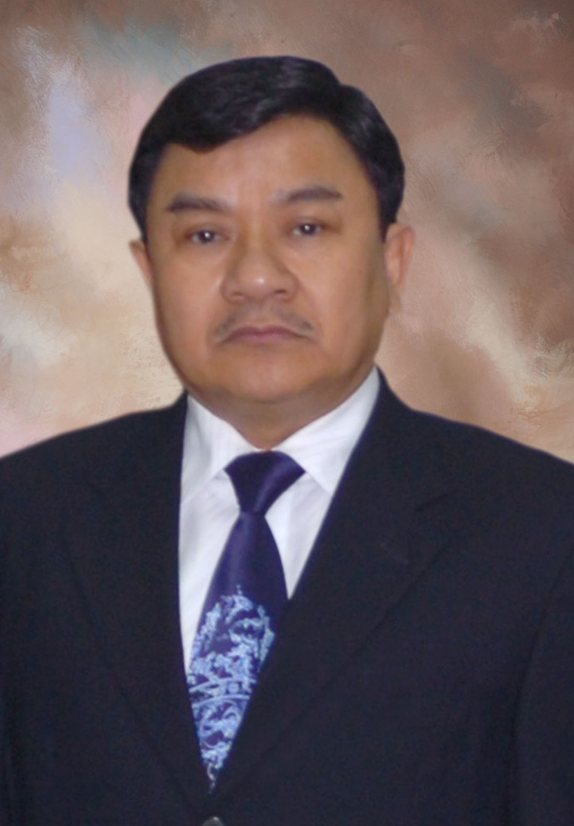 Syamsul Arief Rivai sebagai Direktur Jenderal Pengembangan Daerah KEmenterian Dalam Negeri